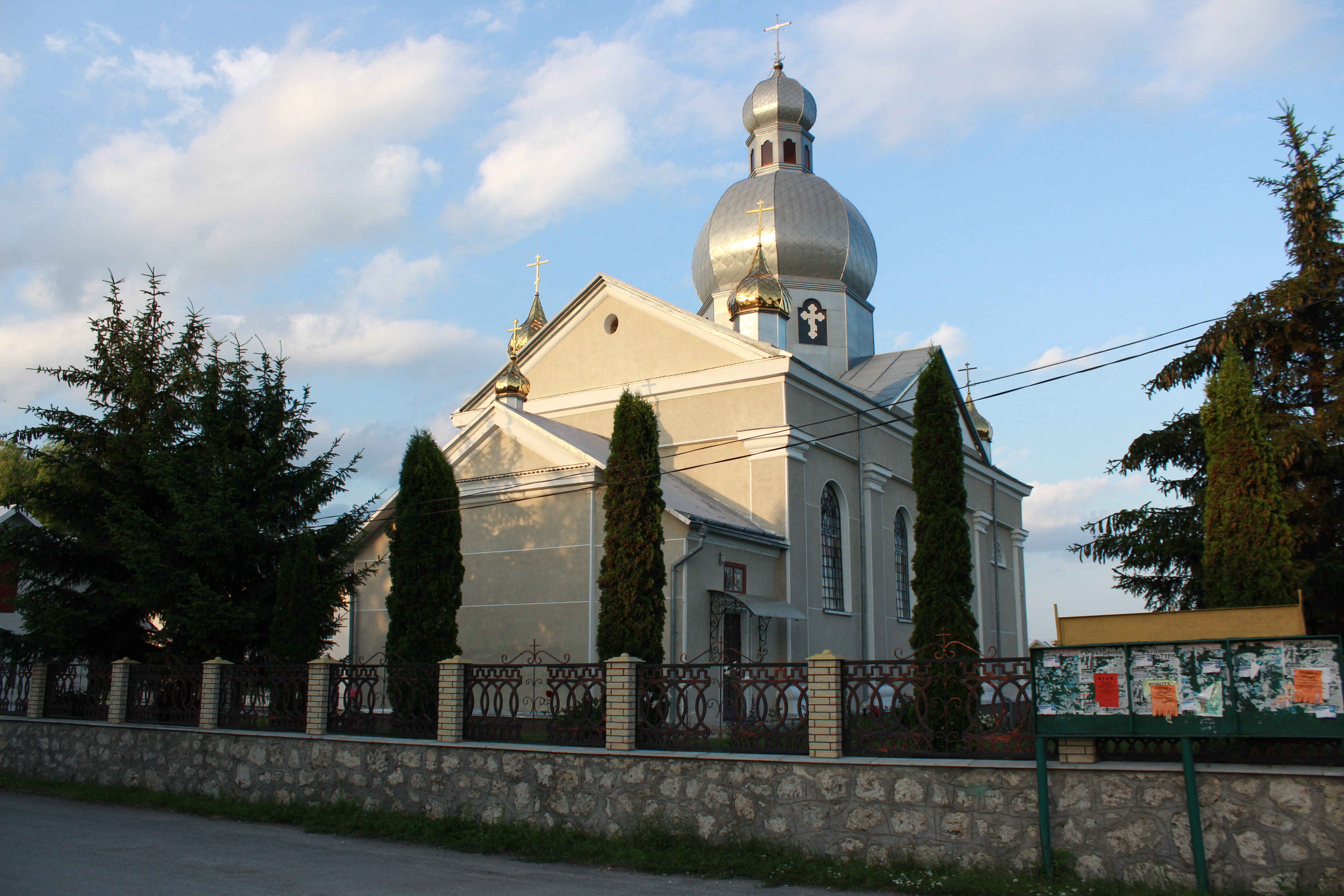 Церква Св. Михаїла (мур.), с. Кам'янки